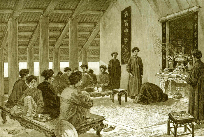 Une cérémonie de mariage au Tonkin